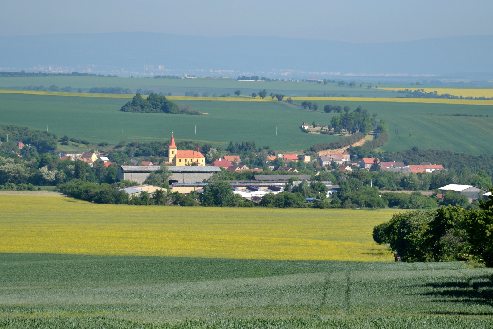 Libořice – pohled od jihu